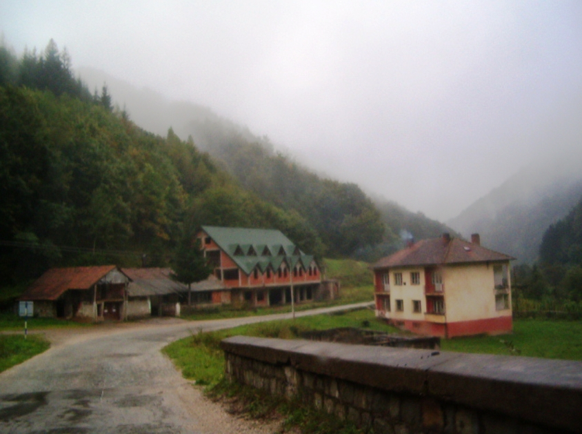 Топли До.